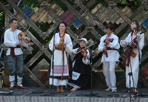 Виступ "Буття" на Країні мрій 08.07.2006 на сцені "Майстерня танців"